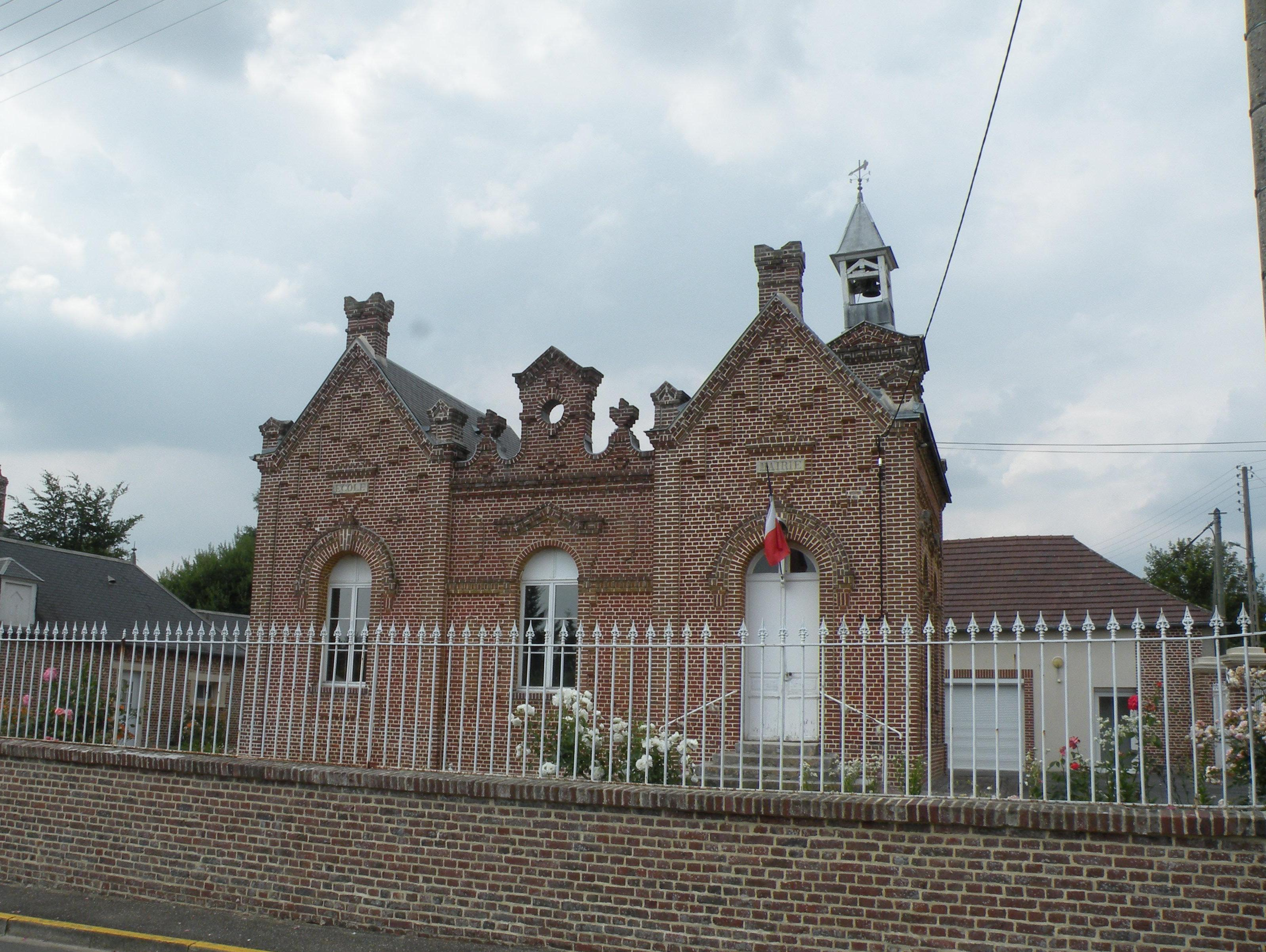 mairie de Corbeil-Cerf